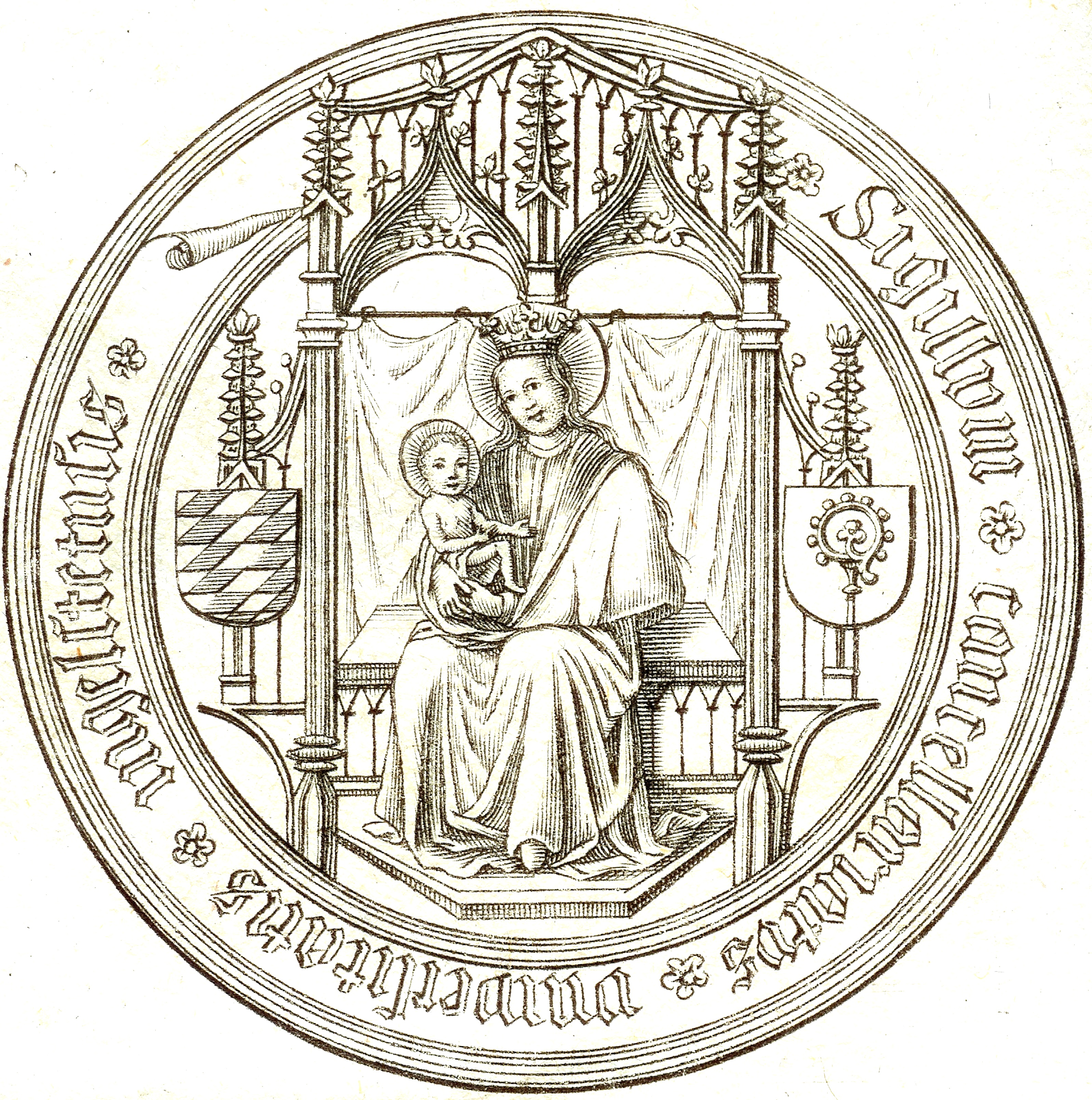 Kanzlersiegel für die Universität Ingolstadt